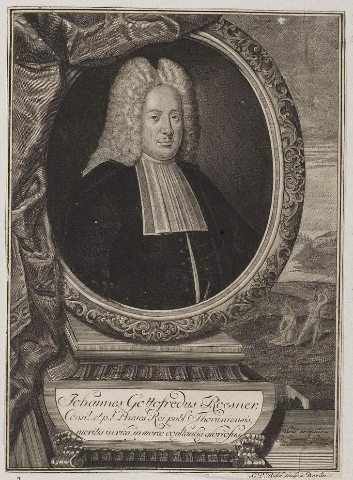 Grafik aus dem Klebeband Nr. 3 der Fürstlich Waldeckschen Hofbibliothek Arolsen Motiv: Johann Gottfried Rösner (1658–1724), Bürgermeister in Thorn, wurde hingerichtet